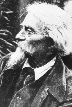 Louis Siret dit Luis Siret, né à Saint Nicolas Waes (Belgique) le 26 août 1860 et mort à Herrerías (province d'Almería, Espagne) le 7 juin 1934, était un archéologue et illustrateur hispano-belge.